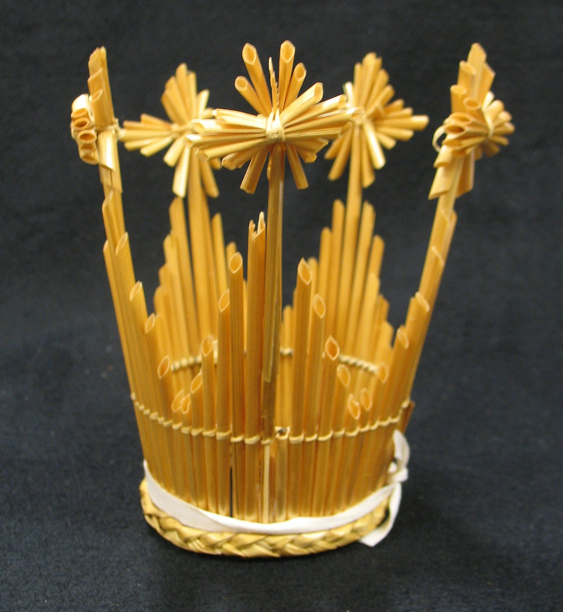 Brudkrona i halm uppbyggd på en trådställning. Prinsessmodell med fem uddar. Kontakter fanns med tidningen Husmodern. Där brudpar som skrev till tidningen kunde de få en halmkrona i present. Ett 1000-tal gjordes. Modell Erland Borglund. Ingår i halmdokumentationen 1983. Förvärvat från:Steneby Hemslöjdsförening Tillverkare:Steneby Hemslöjdsförening Tillverkningsort: Sverige, Dalsland, Västra Götaland, Bengtsfors, Vedb, Steneby, Dals-Långed